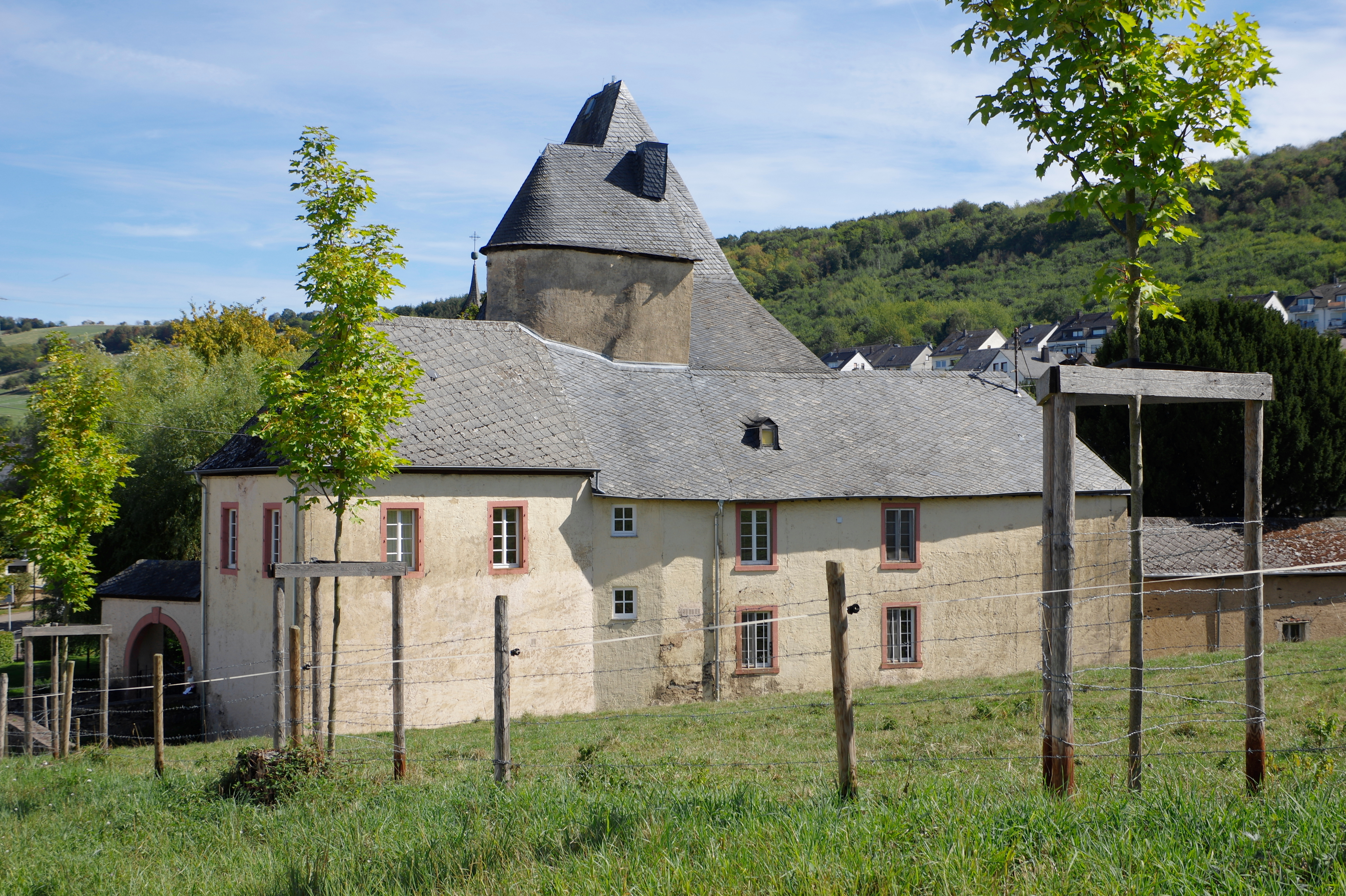 Trier Irsch, Burg, Propstei 4, ehemalige Propstei der Abtei St. Martin in Trier